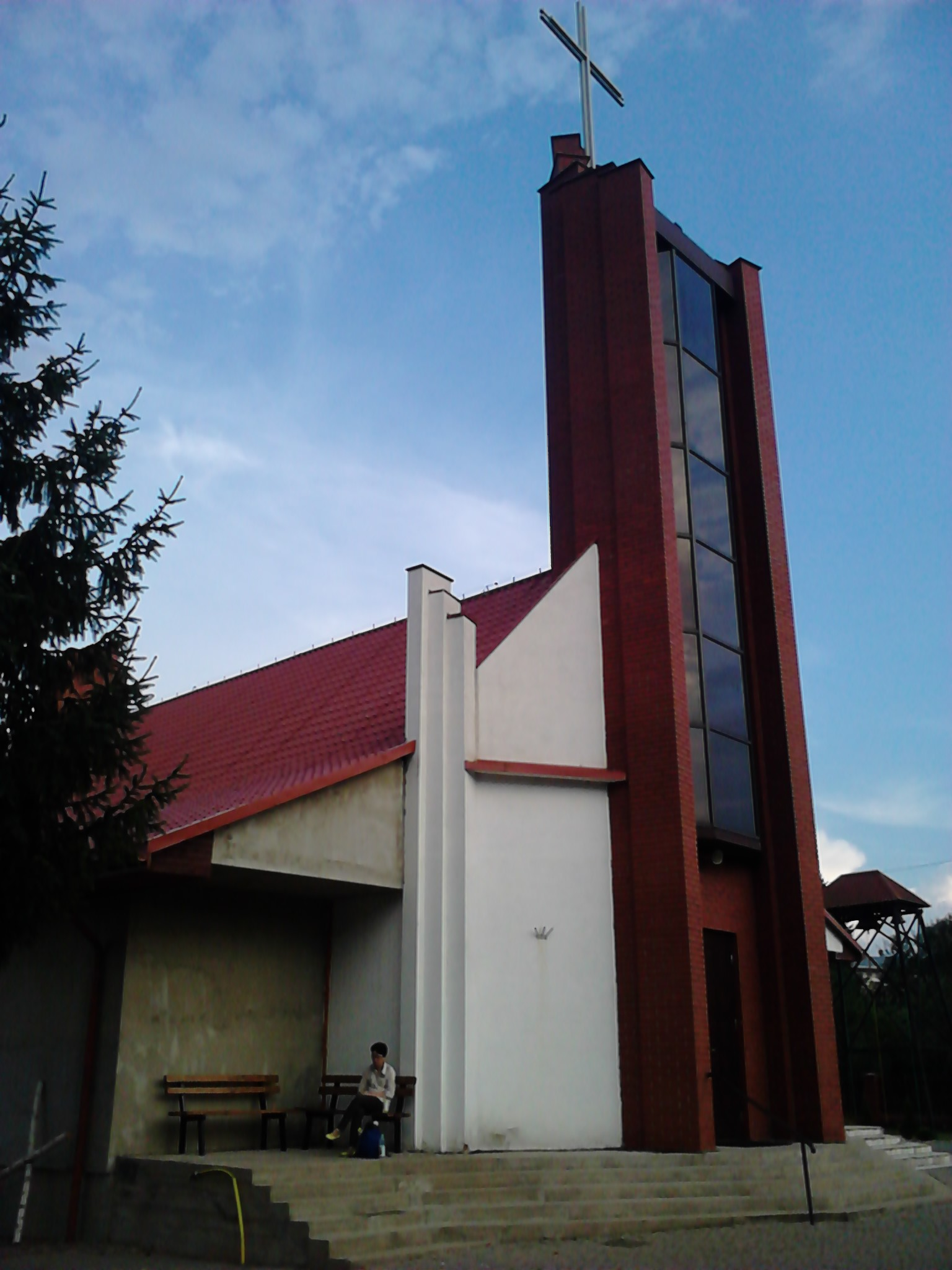 Kościół Przemienienia Pańskiego w Czartajewie